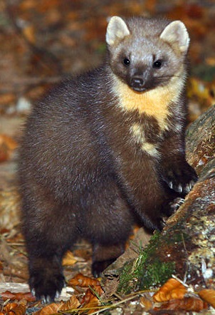 Kuna zlatica (Martes martes)